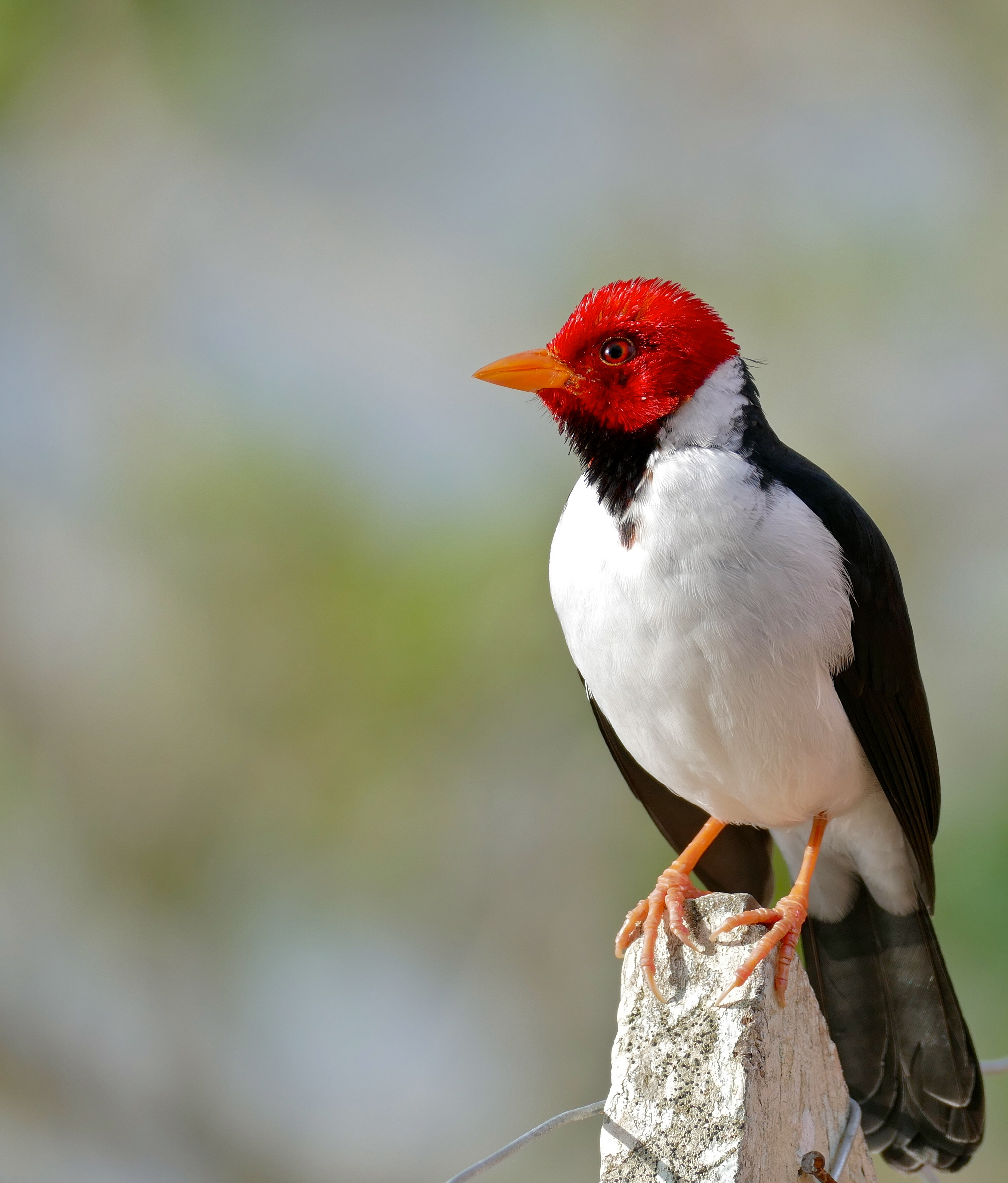 Hotel Pantanal Norte, Pixaim, Transpantaneira, Poconé, Mato Grosso, BRAZIL